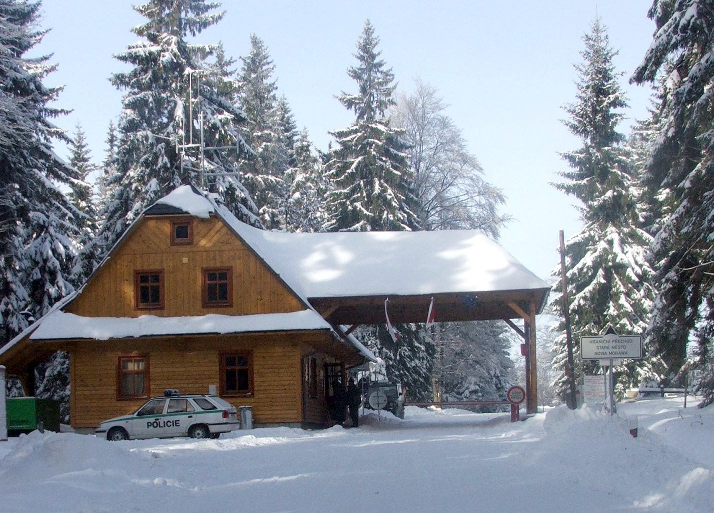 Hraniční přechod Nowa Morawa - Staré Město na česko-polské hranici v Kladském sedle. Pohled z české strany.